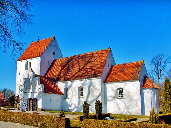 fra sydøst